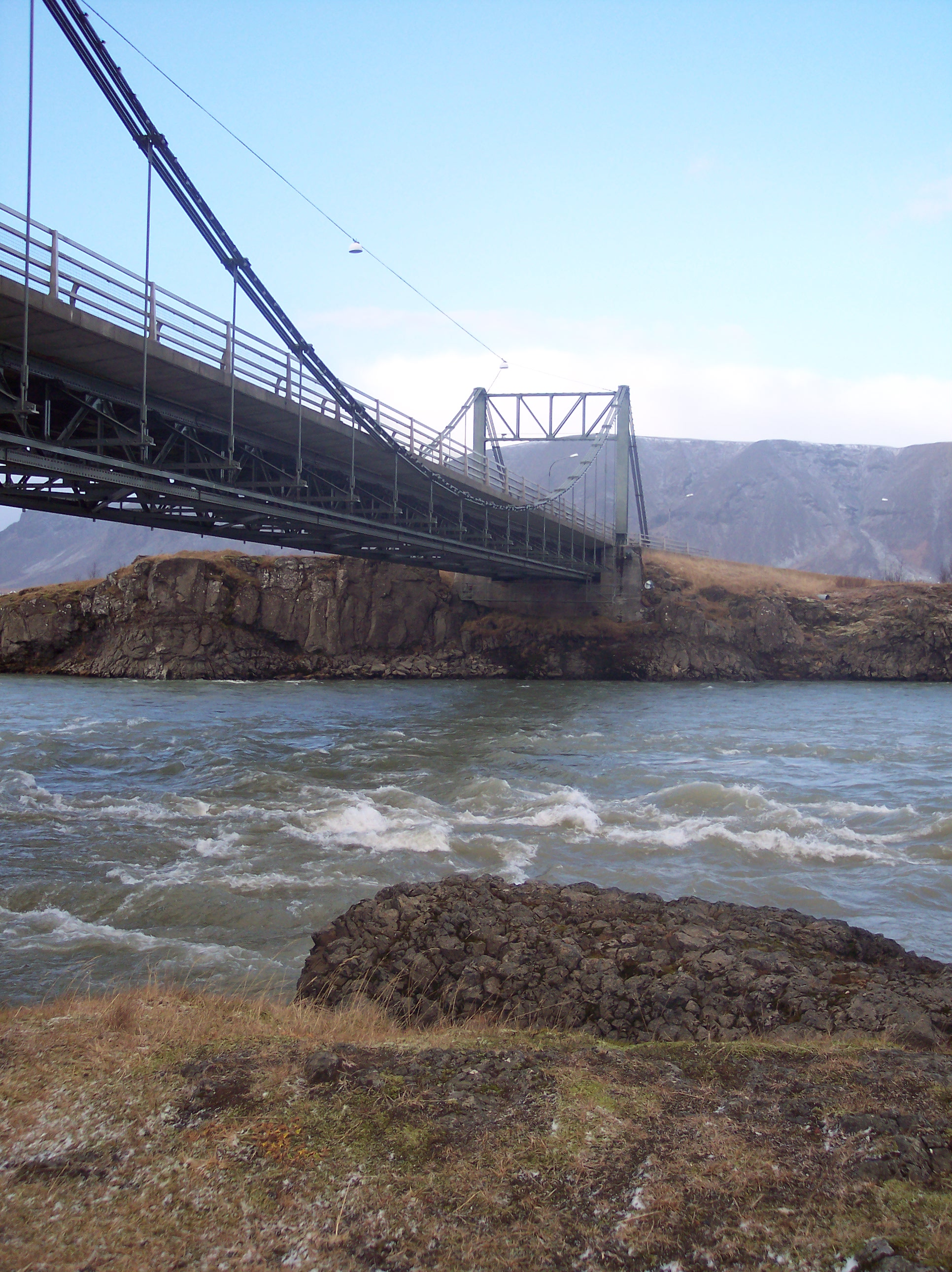 Ölfusárbrú bridge in Selfoss, Iceland. Taken by Jóna Þórunn Ragnarsdóttir, in November 2004. Ölfusárbrú á Selfossi, tekin af austurbakkanum. Höfundur Jóna Þórunn Ragnarsdóttir í nóvember 2004.